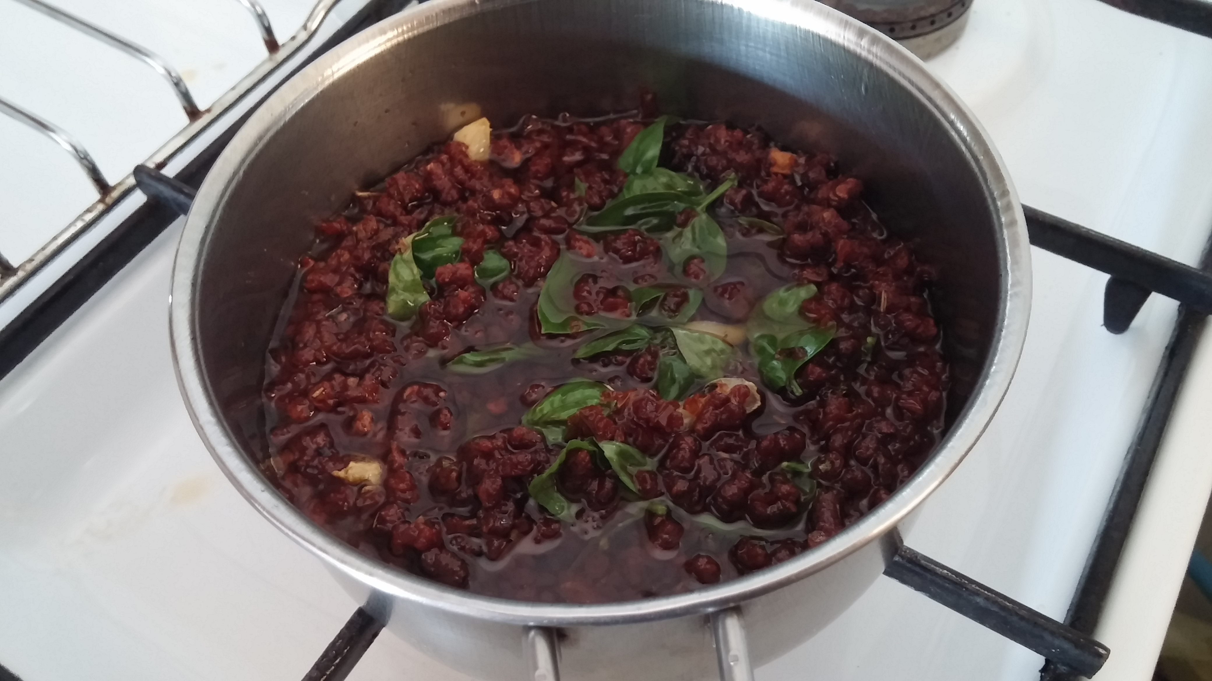 Capuliata siciliana